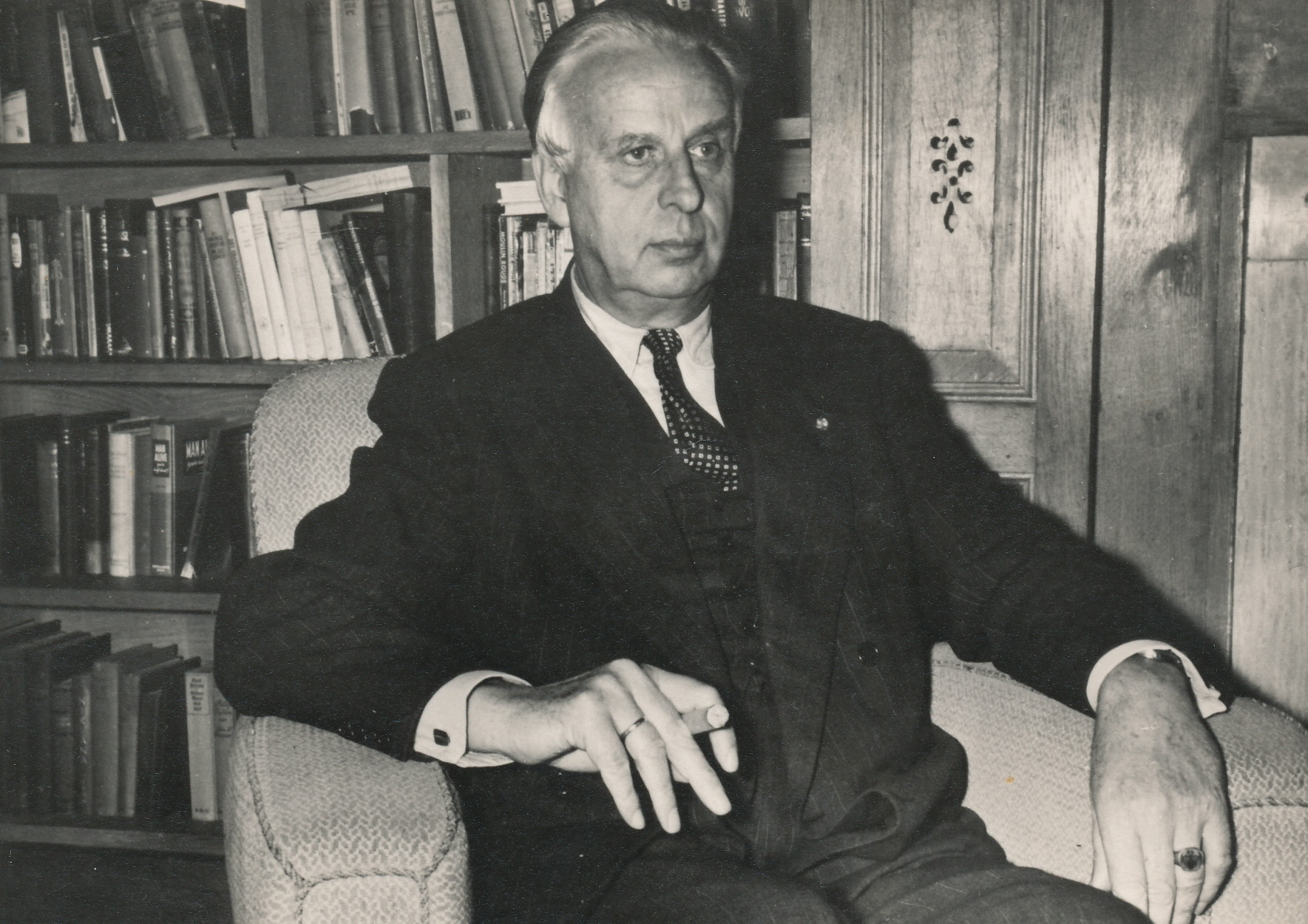 Ir. Dirk Jakobus Klink, omstreeks 1950